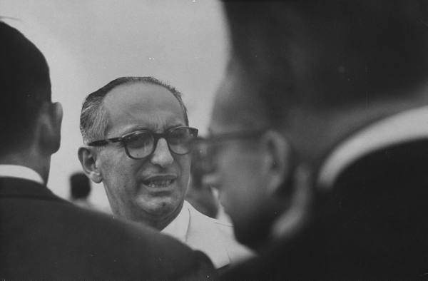 Es una foto del presidente Frondizi en los Estados Unidos.